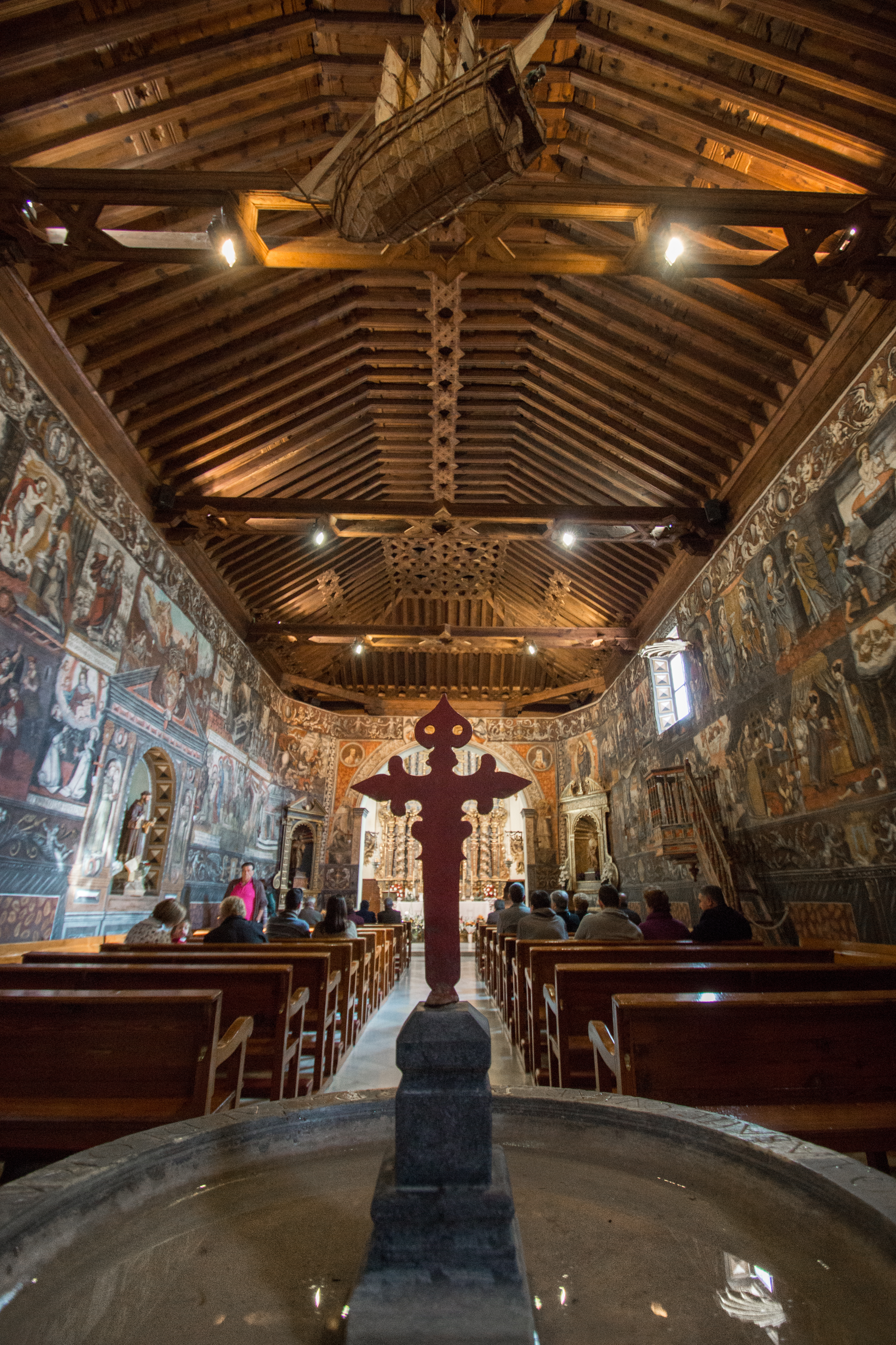 Iglesia de Santa Eulalia de Merida